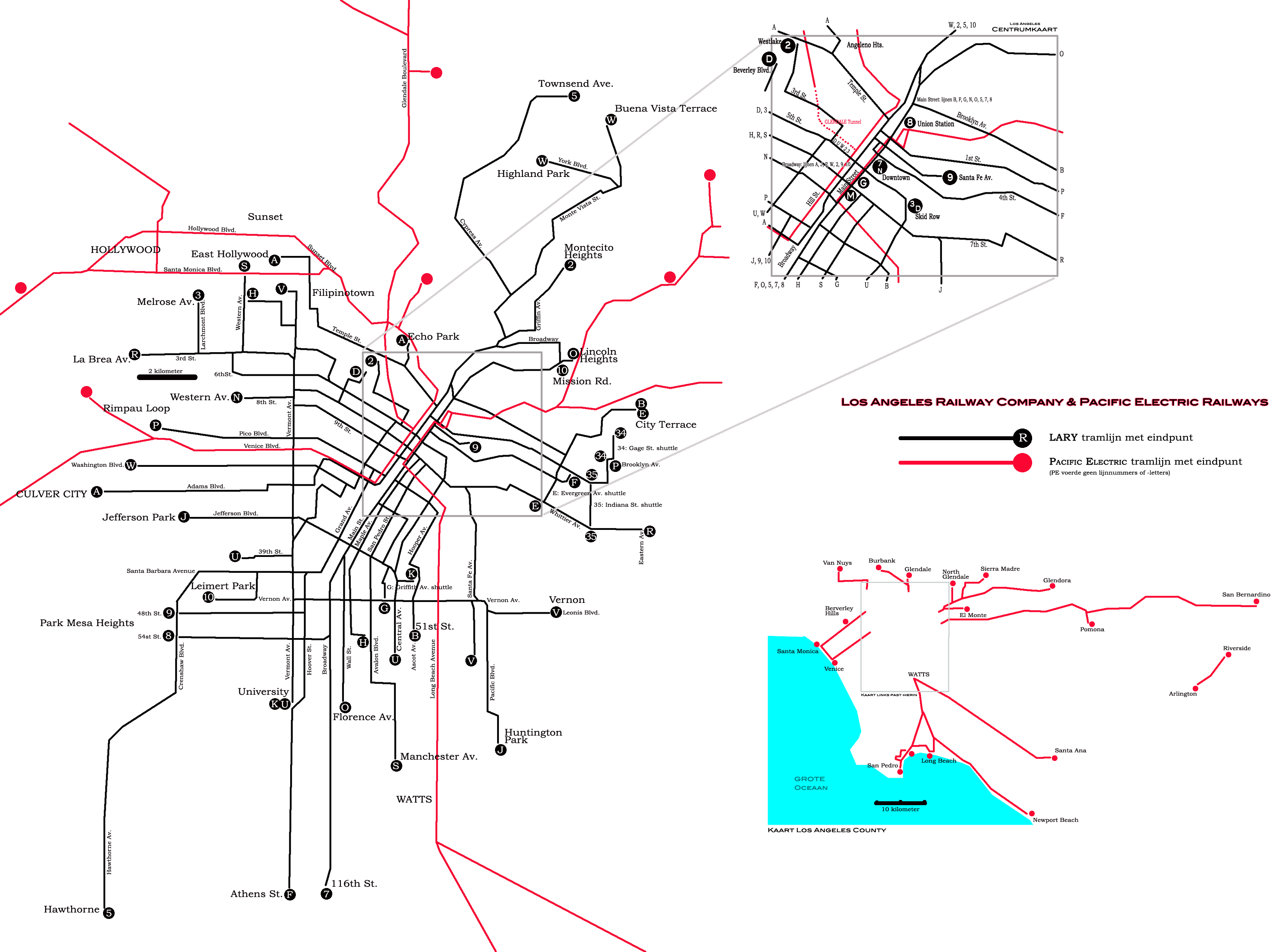 Schematische weergave tramnetten Los Angeles County, USA